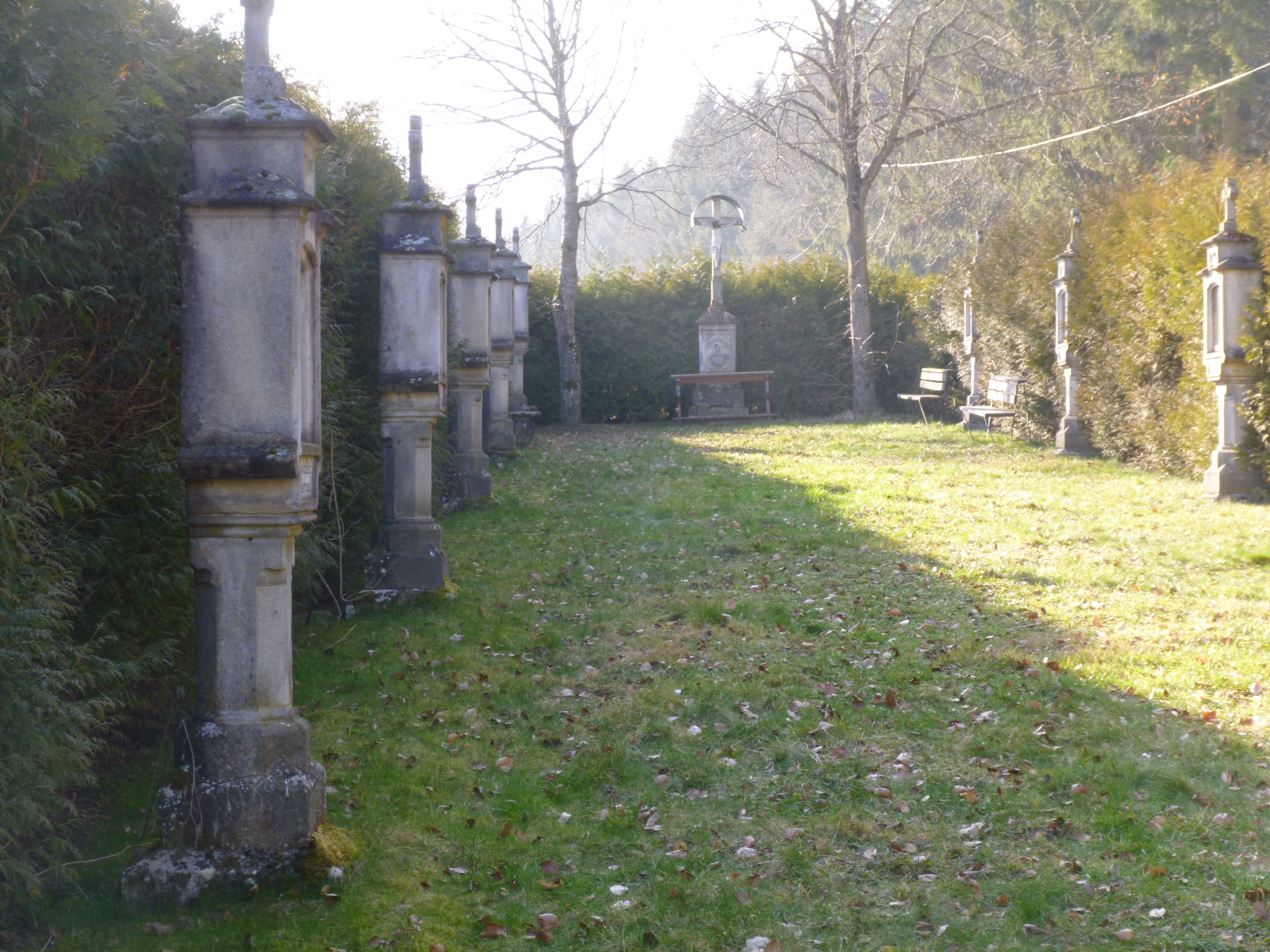 Unterwilzingen Kreuzweg 2014